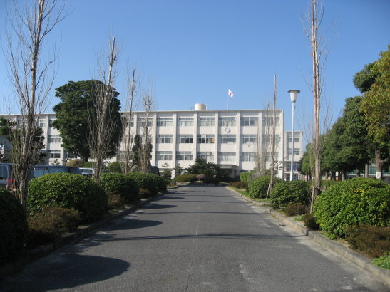 2008年3月27日, 校門より